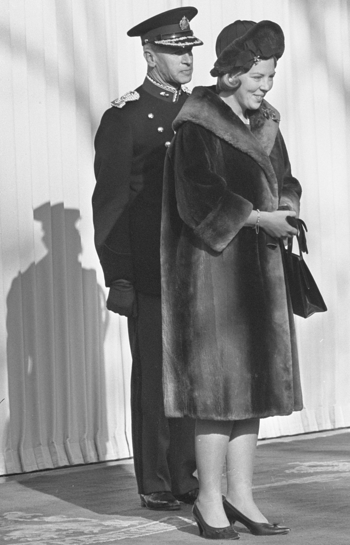 Collectie / Archief : Fotocollectie Anefo Reportage / Serie : [ onbekend ] Beschrijving : 150 jaar Koninklijke Marechaussee , defile op de Maliebaan te Utrecht, overzicht defile Datum : 27 oktober 1964 Locatie : Utrecht Trefwoorden : Defiles Instellingsnaam : Koninklijke Marechaussee Fotograaf : Pot, Harry / Anefo Auteursrechthebbende : Nationaal Archief Materiaalsoort : Negatief (zwart/wit) Nummer archiefinventaris : bekijk toegang 2.24.01.05 Bestanddeelnummer : 917-0645